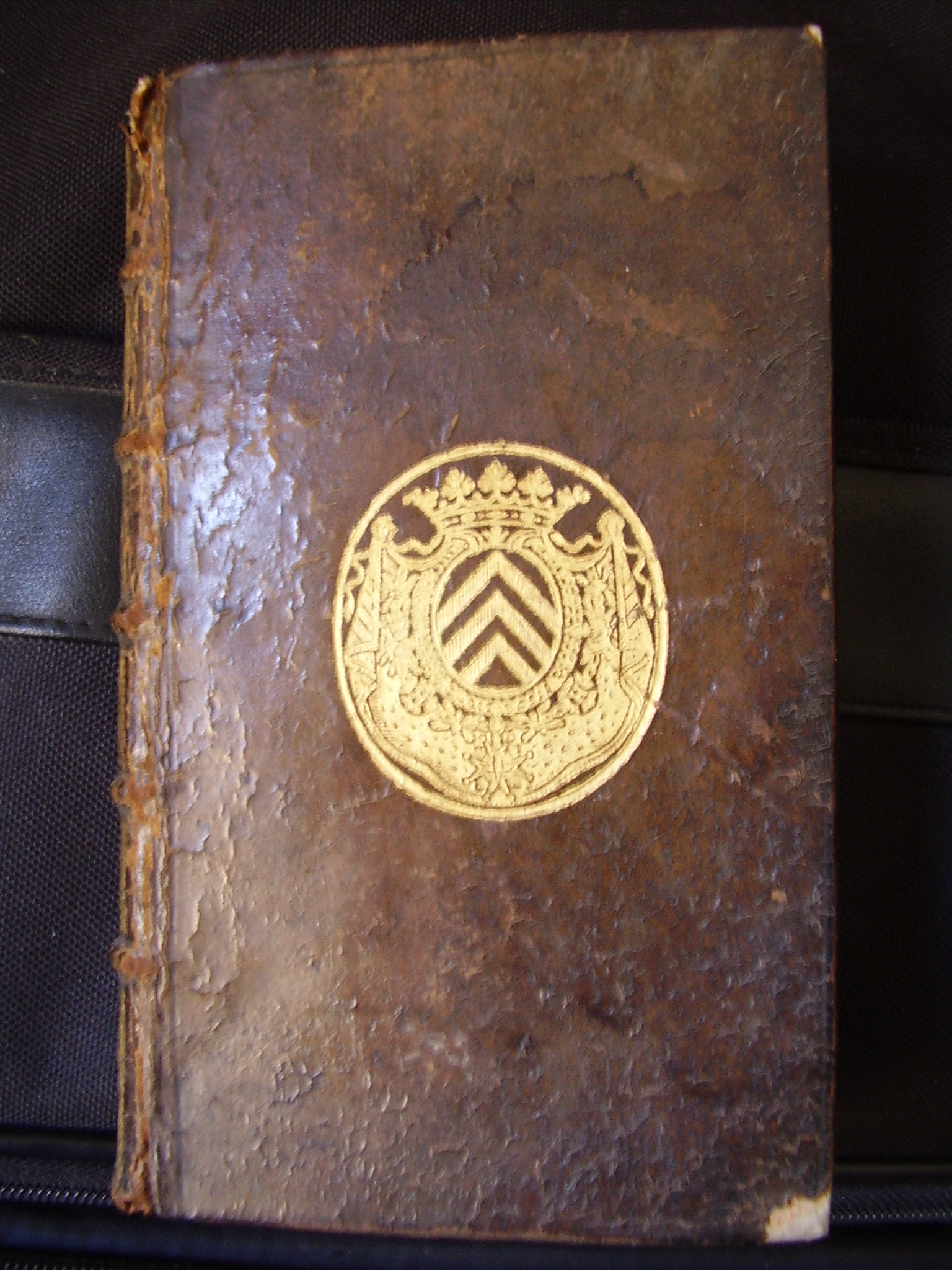 Reliure aux armes du duc de Richelieu